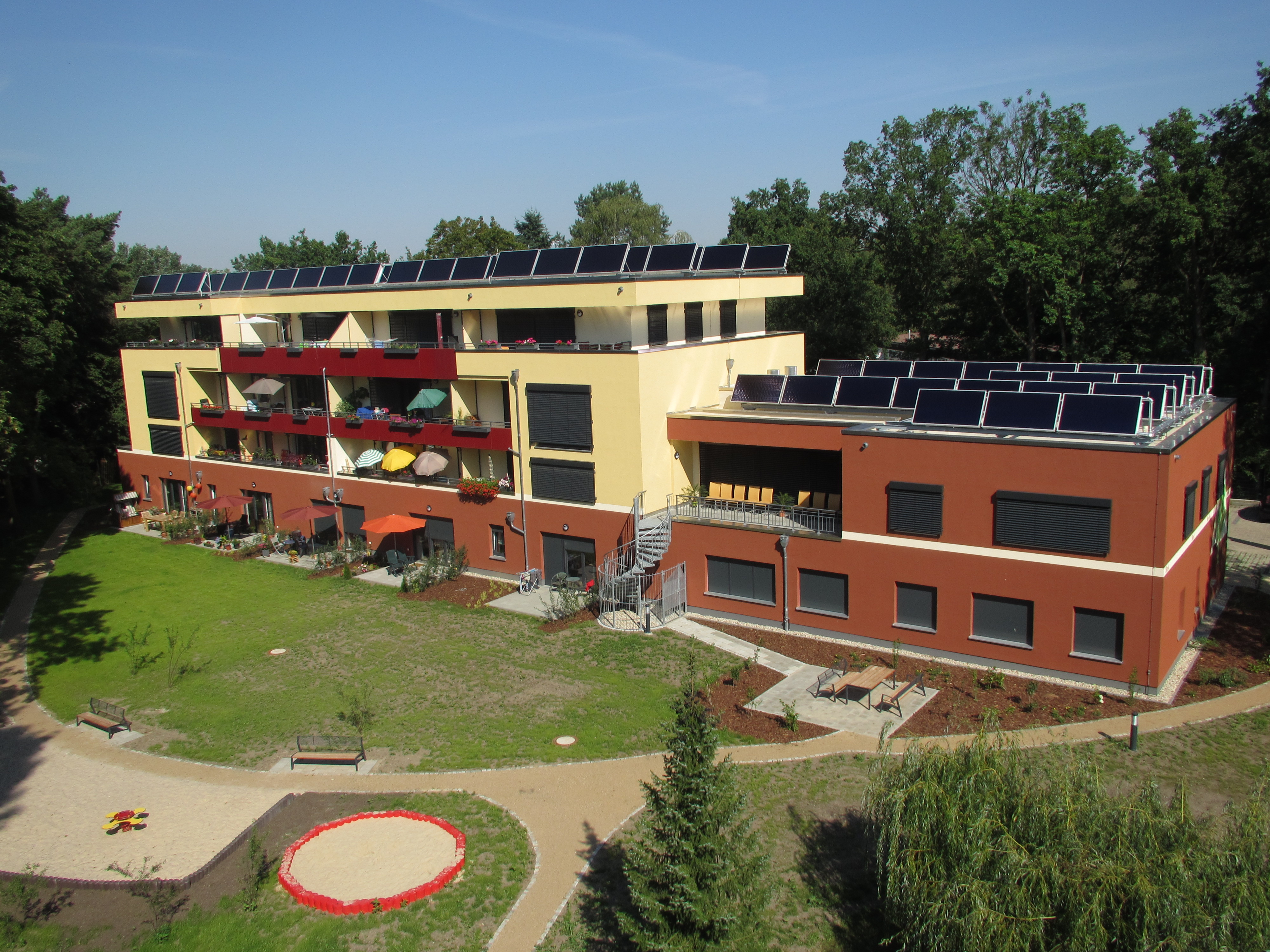 Sonnenhaus der Wohnungsbaugenossenschaft "Aufbau" Strausberg eG - erbaut 2014 - Wohnhaus und Geschäftstselle